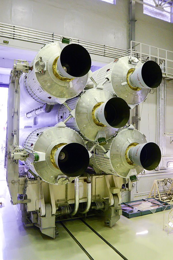 Вывоз ракеты-носителя «Ангара-А5» на стартовый комплекс космодрома Плесецк (Архангельская обл.)